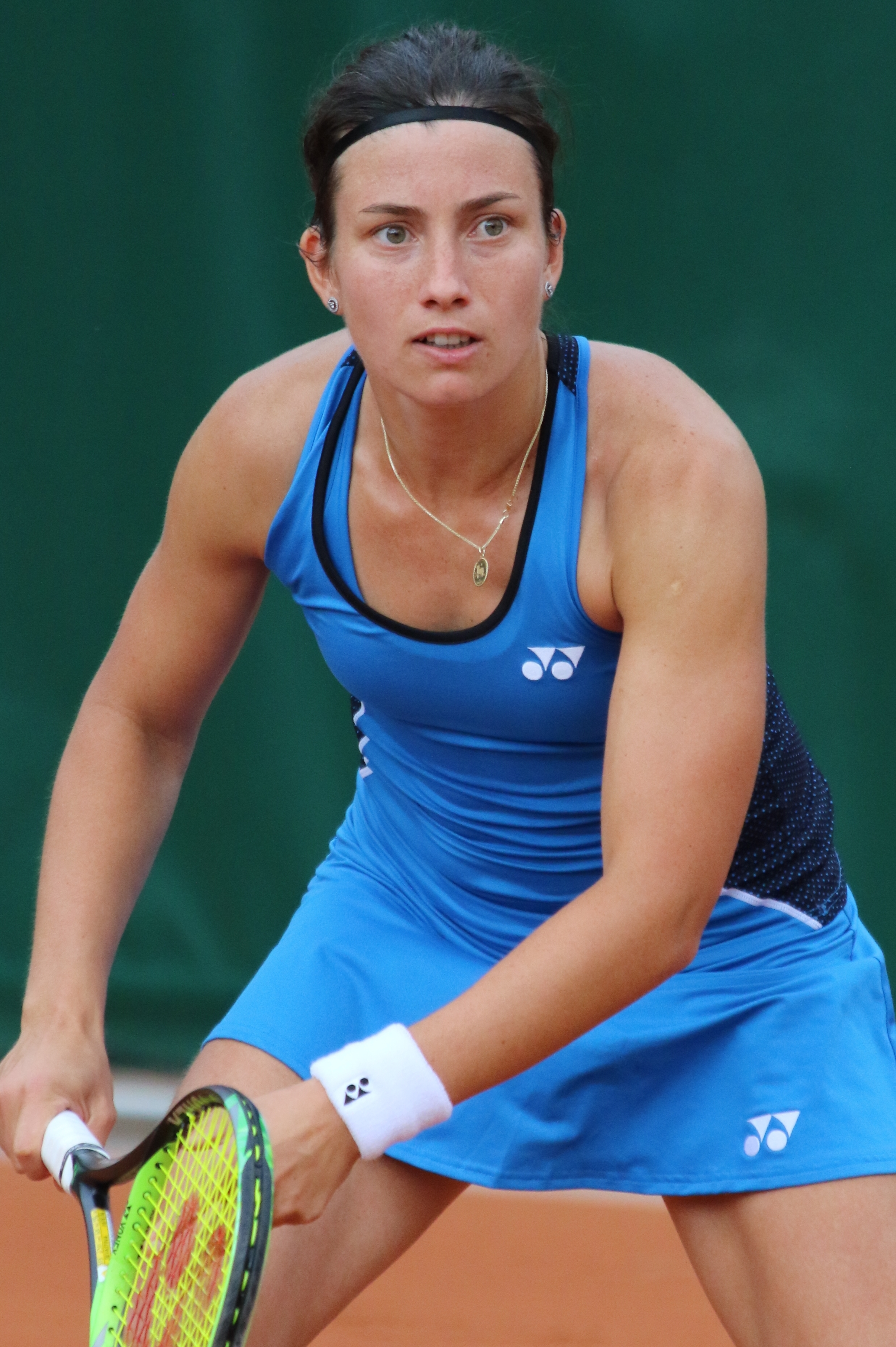 Sevastova RG18 (4)